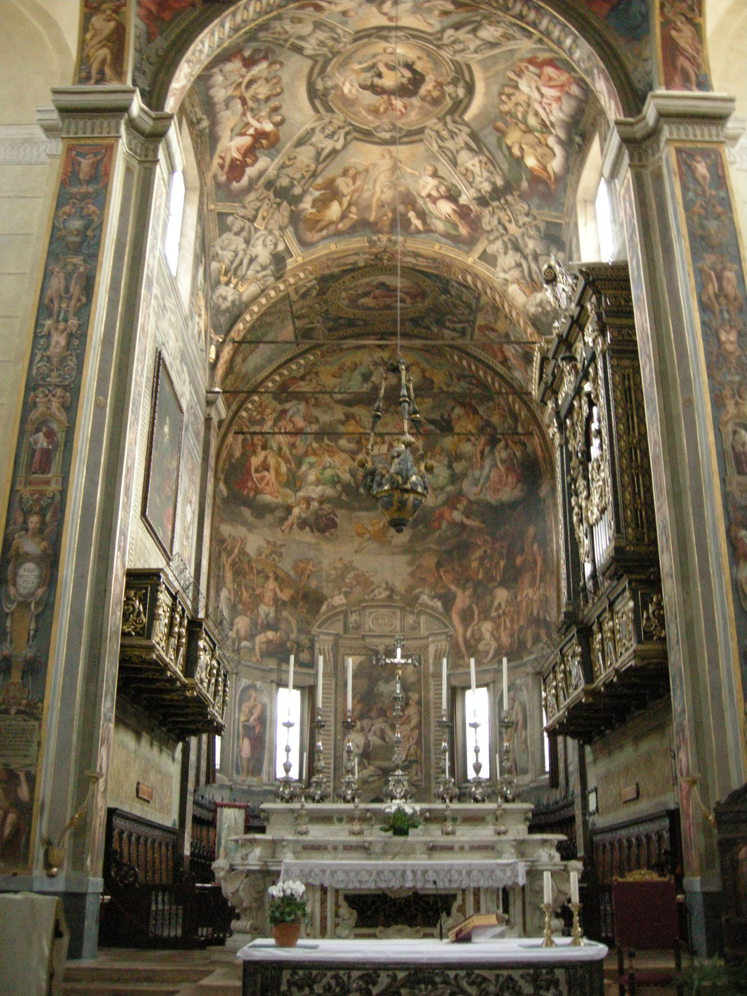 San Prospero (Reggio Emilia), interno. Gli affreschi dell'abside, raffiguranti il Giudizio Universale, sono opera di Camillo Procaccini